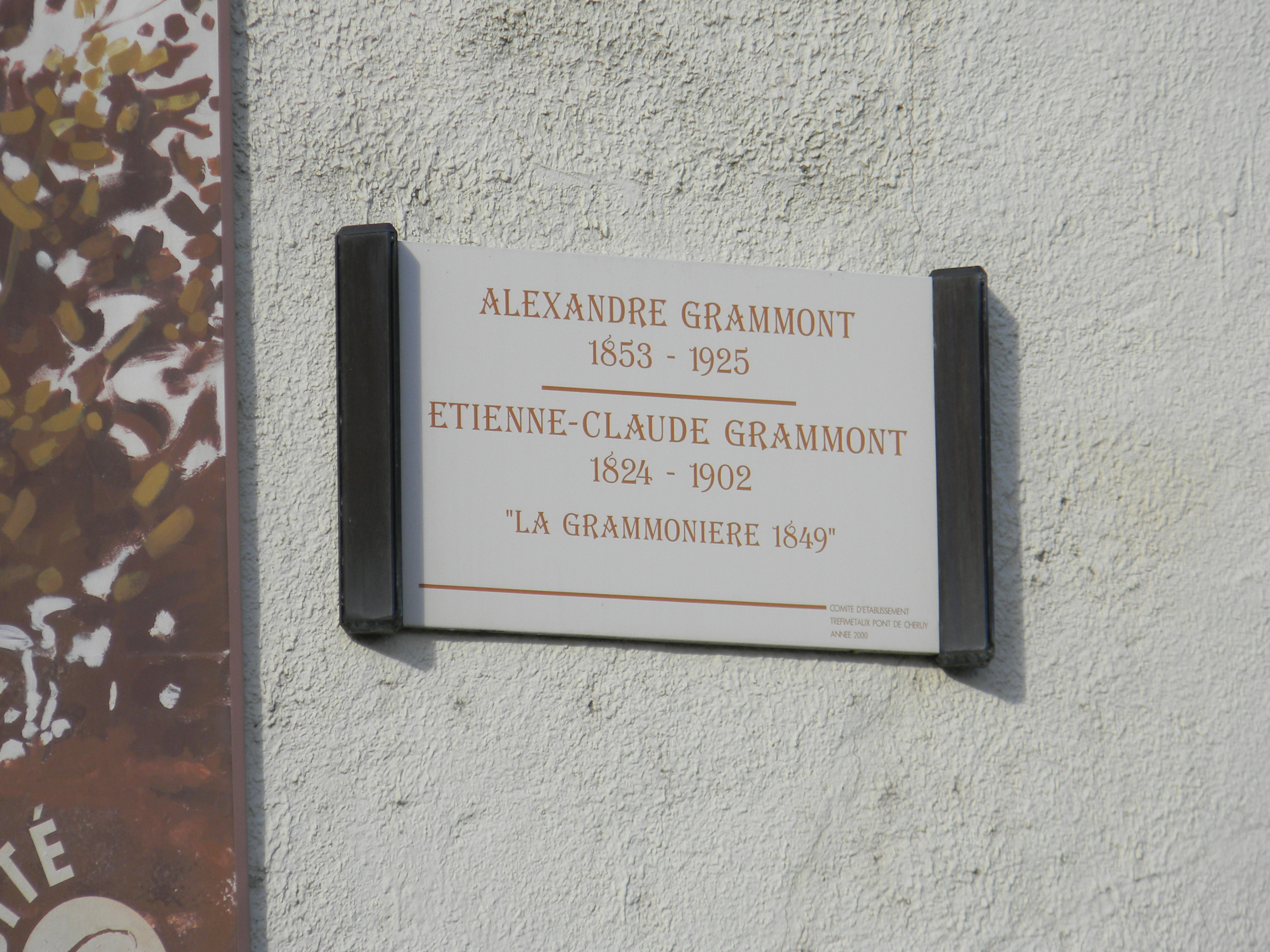 Plaque à l'effigie des Grammont père et fils sur une usine de Pont-de-Chéruy. Alexandre Grammont 1853-1925 Étienne-Claude Grammont 1824-1902 "La Grammonière 1849"